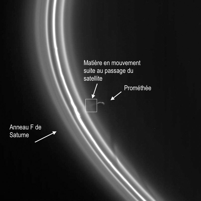 Identification de différents éléments sur une image des anneaux de Saturne et du satellite berger Prométhée.